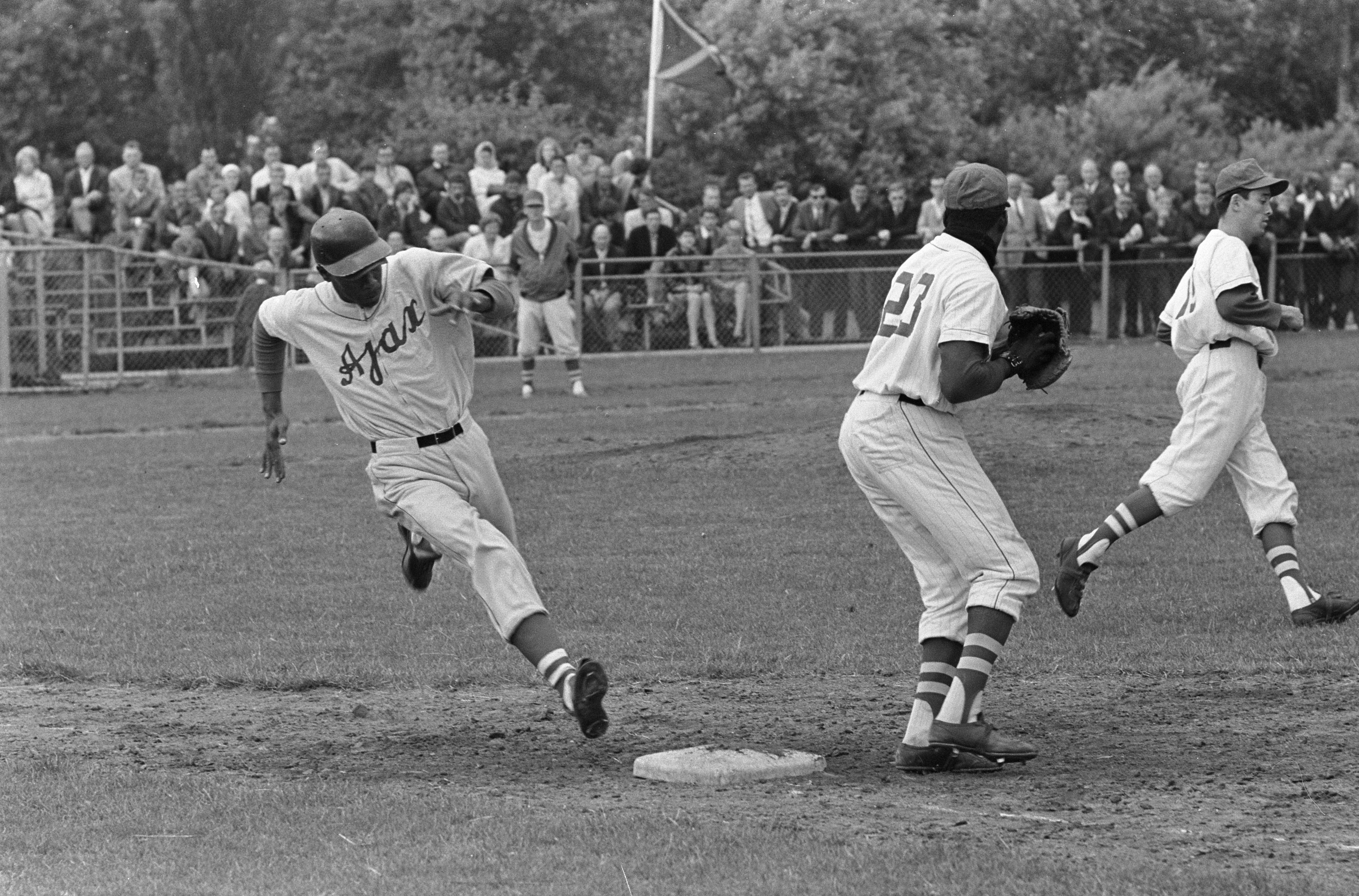 Collectie / Archief : Fotocollectie Anefo Reportage / Serie : [ onbekend ] Beschrijving : Honkbal Ajax tegen Sparta. Spelmoment Datum : 23 juli 1967 Trefwoorden : HONKBAL Instellingsnaam : AJAX, Sparta Fotograaf : Merk, Ben / Anefo Auteursrechthebbende : Nationaal Archief Materiaalsoort : Negatief (zwart/wit) Nummer archiefinventaris : bekijk toegang 2.24.01.05 Bestanddeelnummer : 920-5307